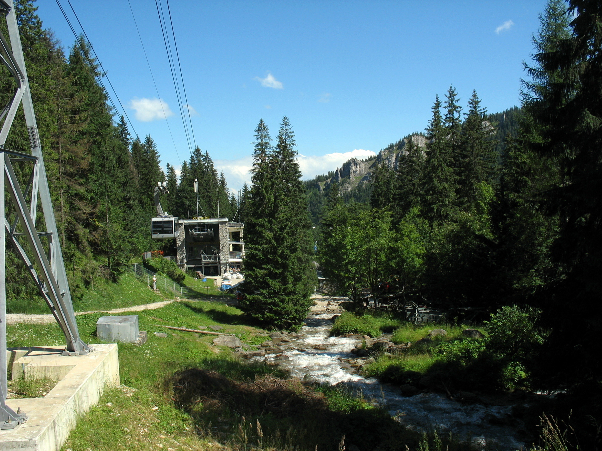 Potok Bystra, Kuźnice, Tatry, Kasprowy Wierch, kolej linowa